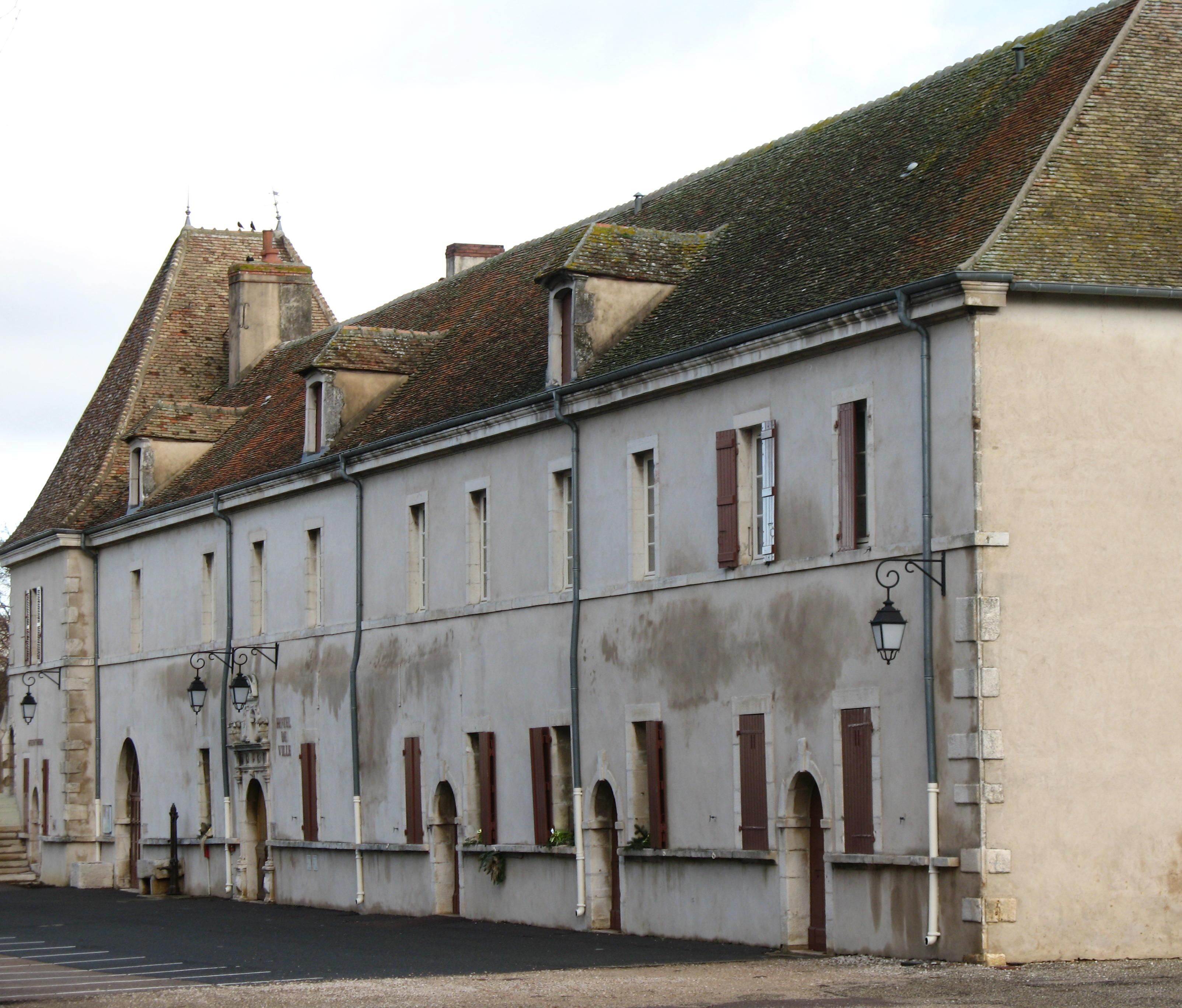 château de Sennecey-le-Grand (Saône-et-Loire)